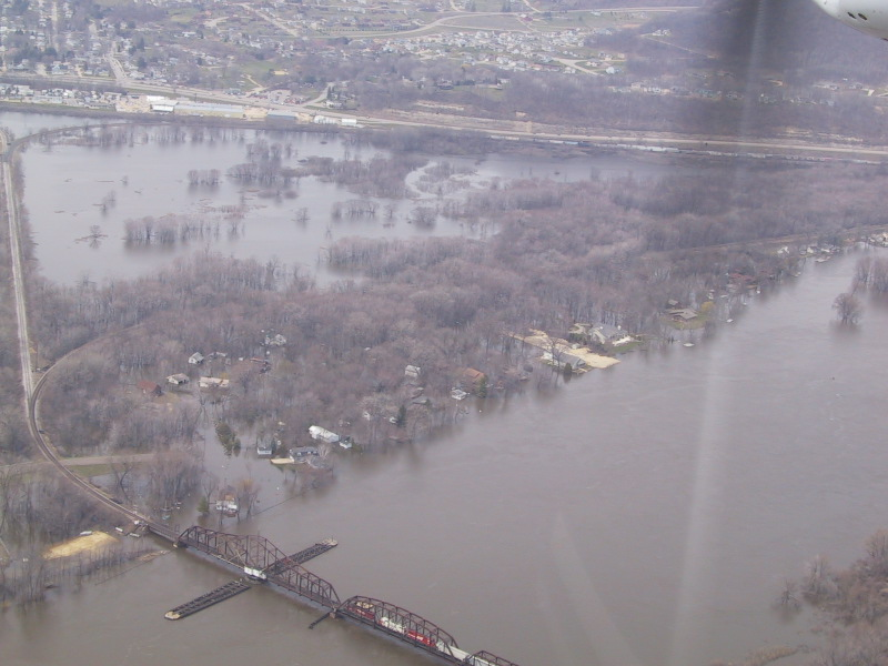 La_Crosse_CP_Mississippi_bridge